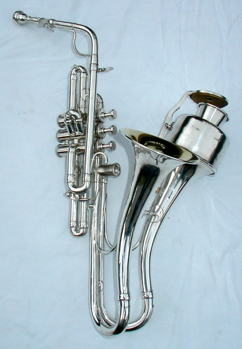 Jazzophone